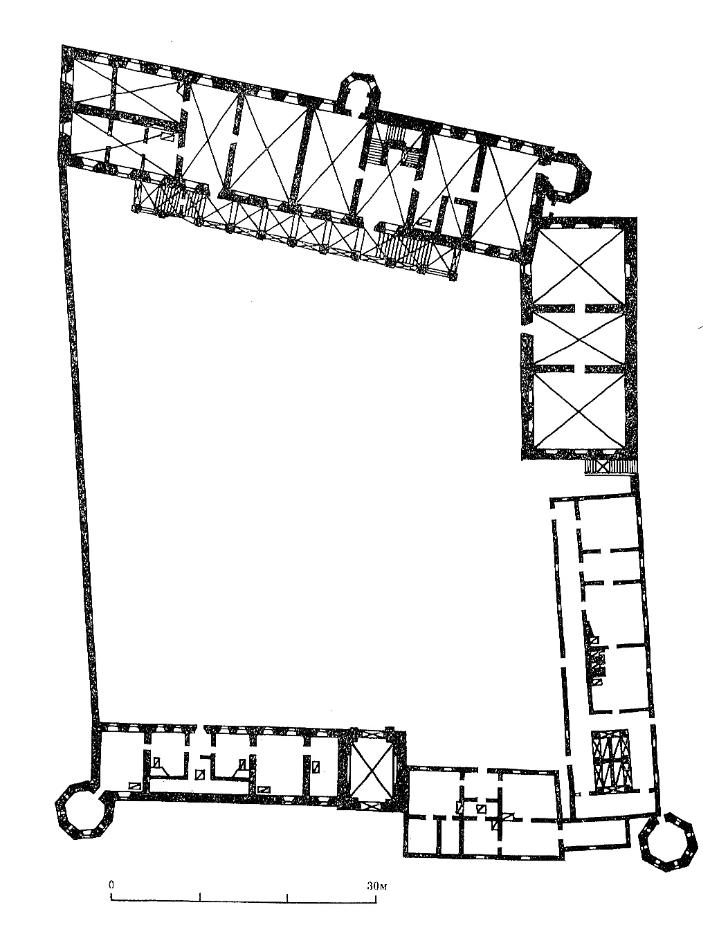 План Быхаўскага замка